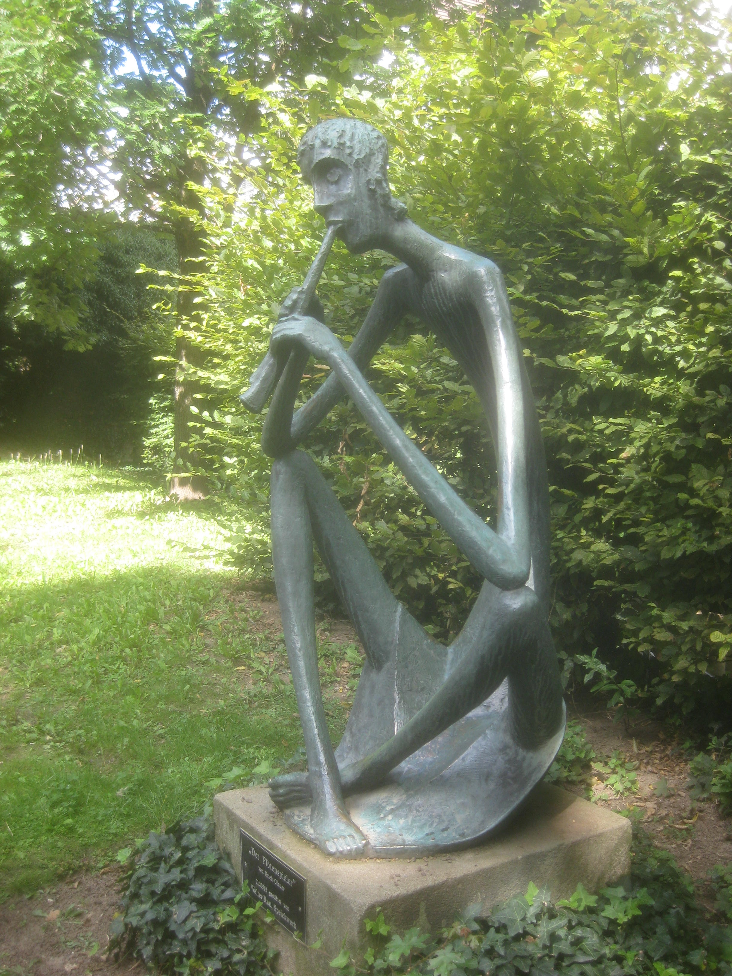 Der Flötenspieler, Skulptur von Erich Glauer, Bronze, 1962, Stuttgart-Möhringen, Filderbahnstraße 29/1.